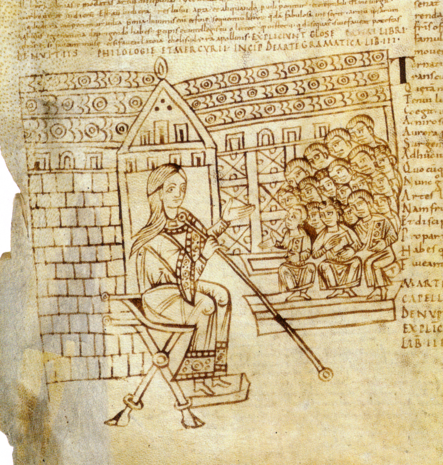 Martianus Capella, Noces de Philologie et de Mercure La Grammaire et son amphithéâtre d'élèves Commentaire partiel de Rémi d'Auxerre Italie (?), Xe siècle